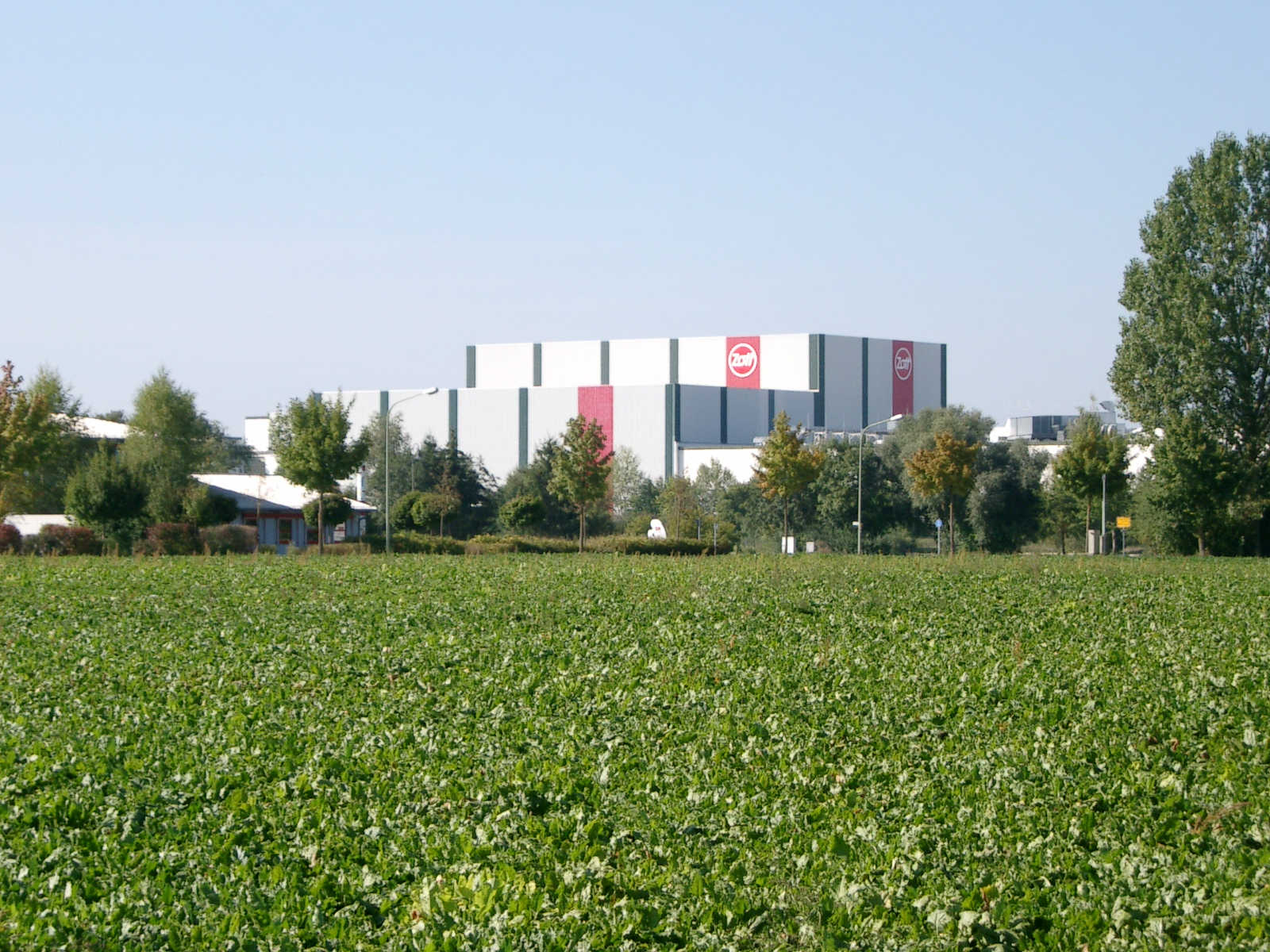 Unternehmenssitz Zott GmbH & Co. KG - Mertingen